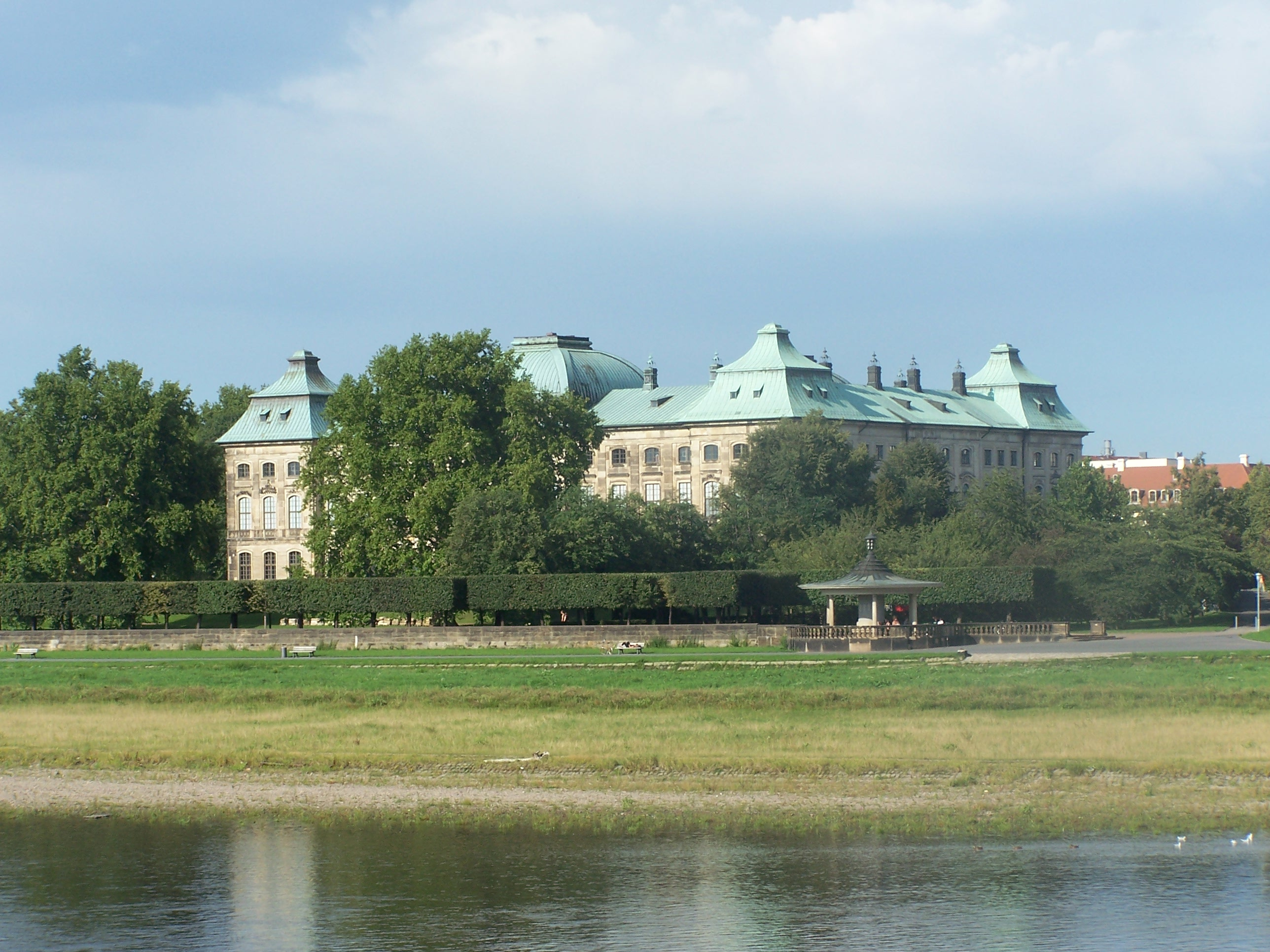 Japanisches Palais in Dresden vom anderen Elbufer aus